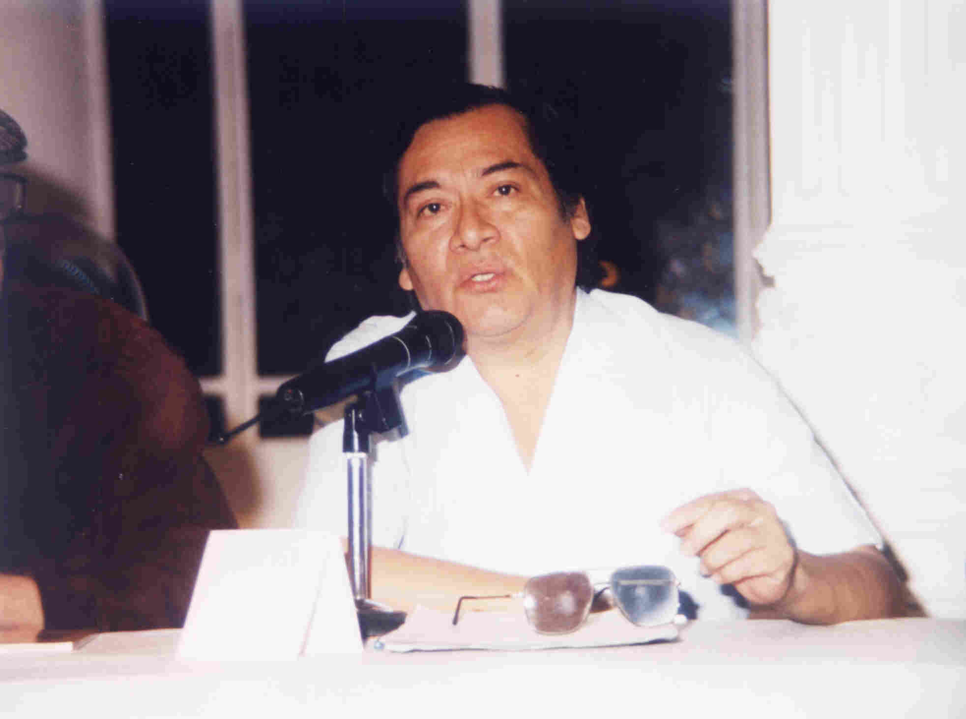 Macario Matus en lectura de poemas.